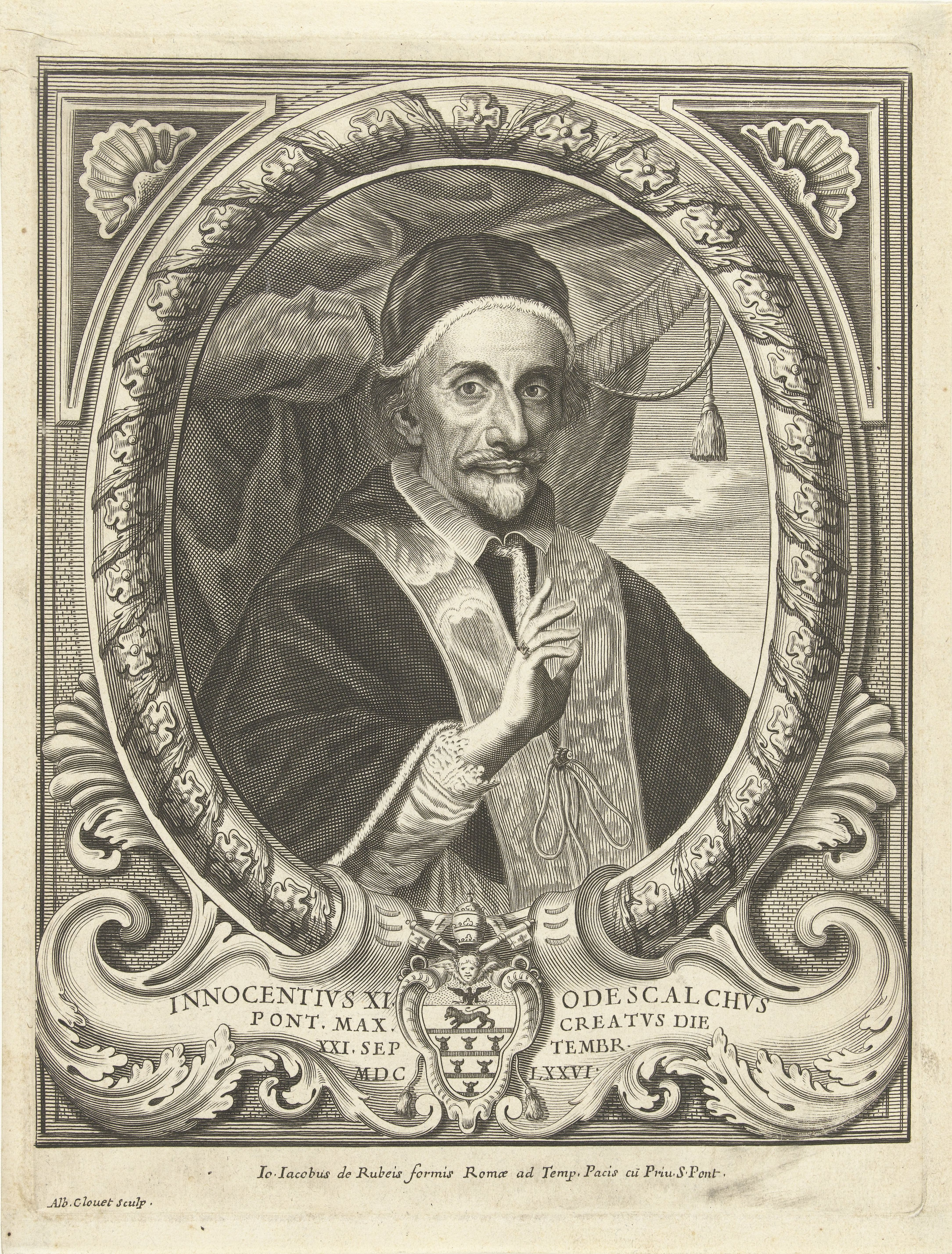 IdentificatieTitel(s): Portret van Innocentius XIObjecttype: prent Objectnummer: RP-P-1908-870Catalogusreferentie: LeBlanc 26Opschriften / Merken: verzamelaarsmerk, verso midden onder, gestempeld: Lugt 2228Omschrijving: Portret in ovale lijst van paus Innocentius XI. Buste naar rechts. Midden onder een cartouche met het wapen van Innocentius XI.VervaardigingVervaardiger: prentmaker: Albertus Clouwet (vermeld op object)naar eigen ontwerp van: Albertus Clouwetuitgever: Giovanni Giacomo de'Rossi (vermeld op object)Plaats vervaardiging: RomeDatering: 1676 - 1679Fysieke kenmerken: gravureMateriaal: papier Techniek: graveren (drukprocedé)Afmetingen: plaatrand: h 246 mm × b 186 mmOnderwerpWie: Innocentius XIVerwerving en rechtenVerwerving: aankoop 1905Copyright: Publiek domein